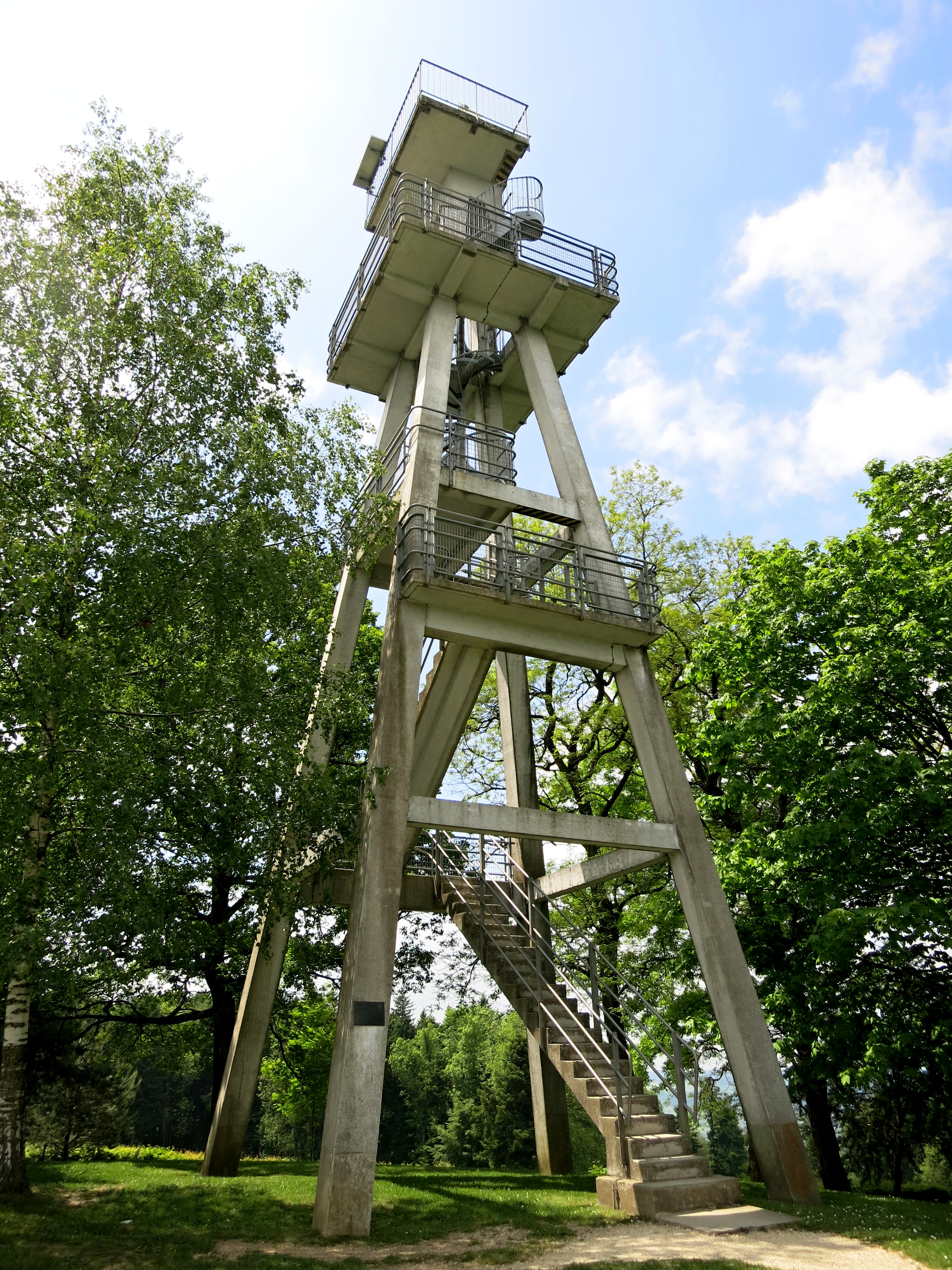 Hombergturm